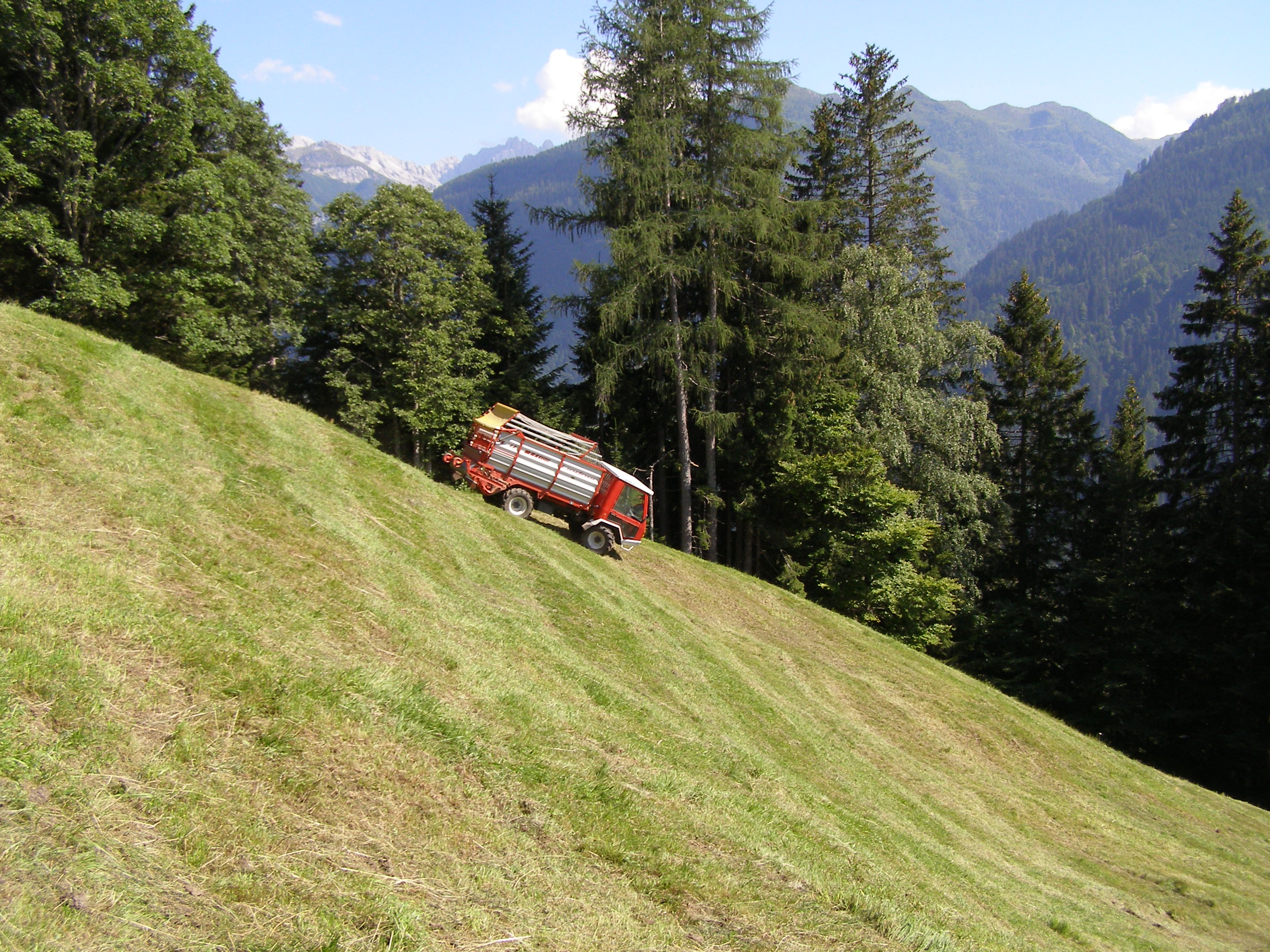 Auch in der heutigen Zeit ist die bäuerliche Arbeit im Lesachtal immer noch sehr schwer